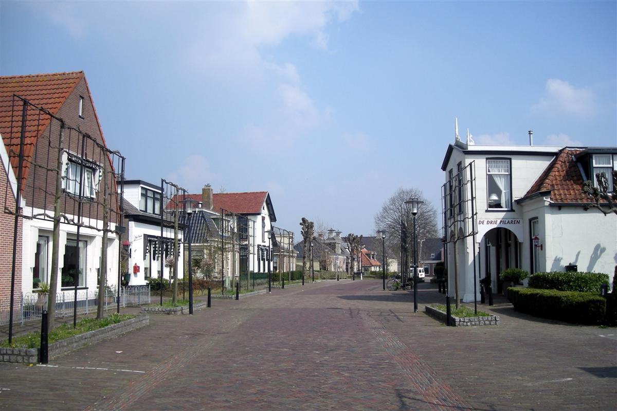 Schoterlandseweg in Oudeschoot